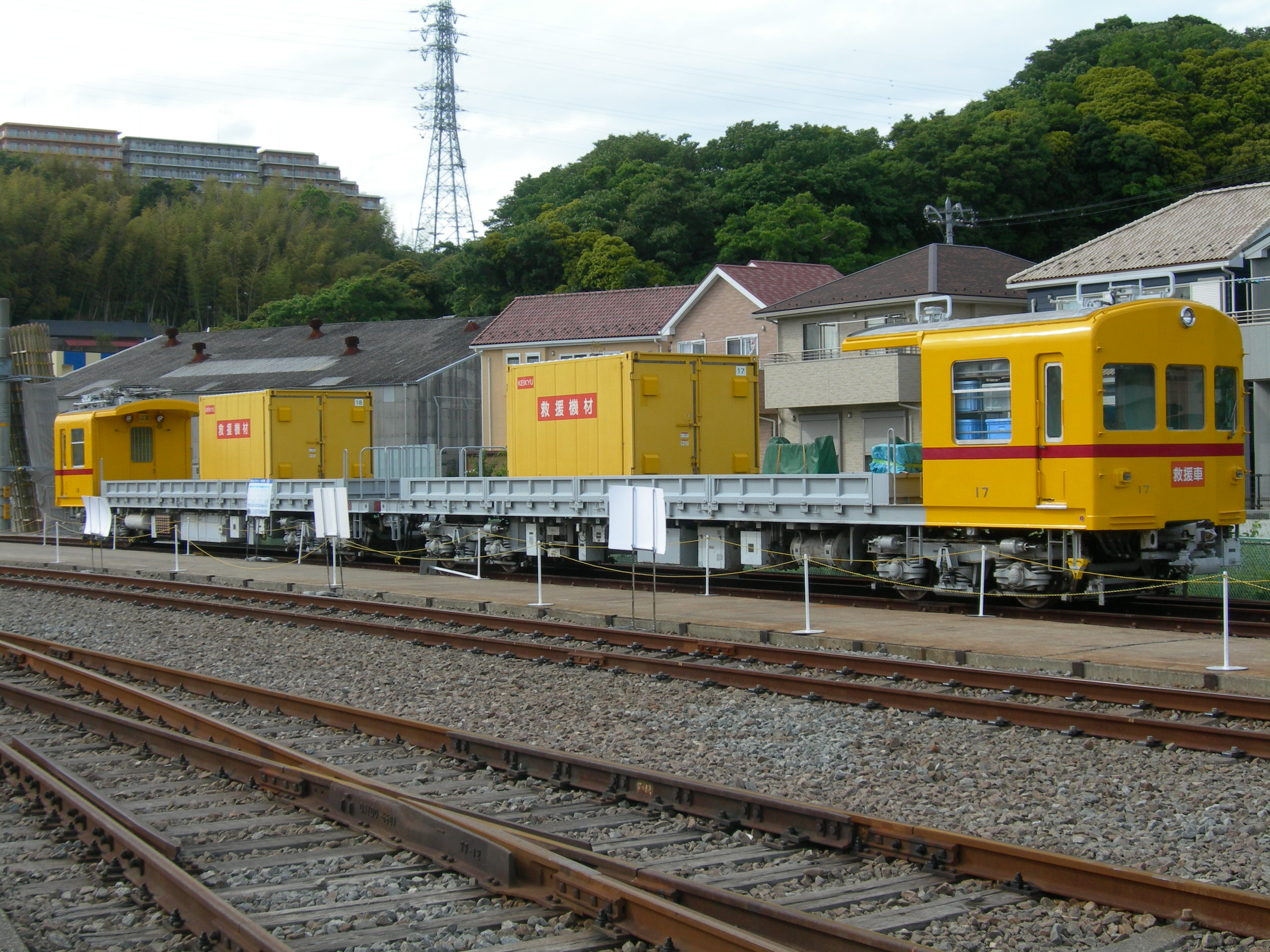 京浜急行電鉄 デト17・18形